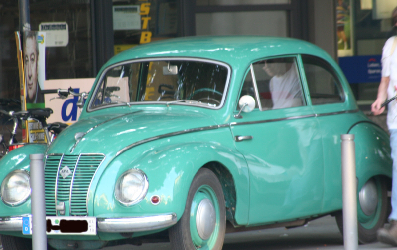 Bildbeschreibung: IFA F9 auf einer Oldtimer-Veranstaltung Quelle: eigenes Foto Fotograf/Zeichner: pc_fish Datum: September 2005 Sonstiges: frei verwendbar